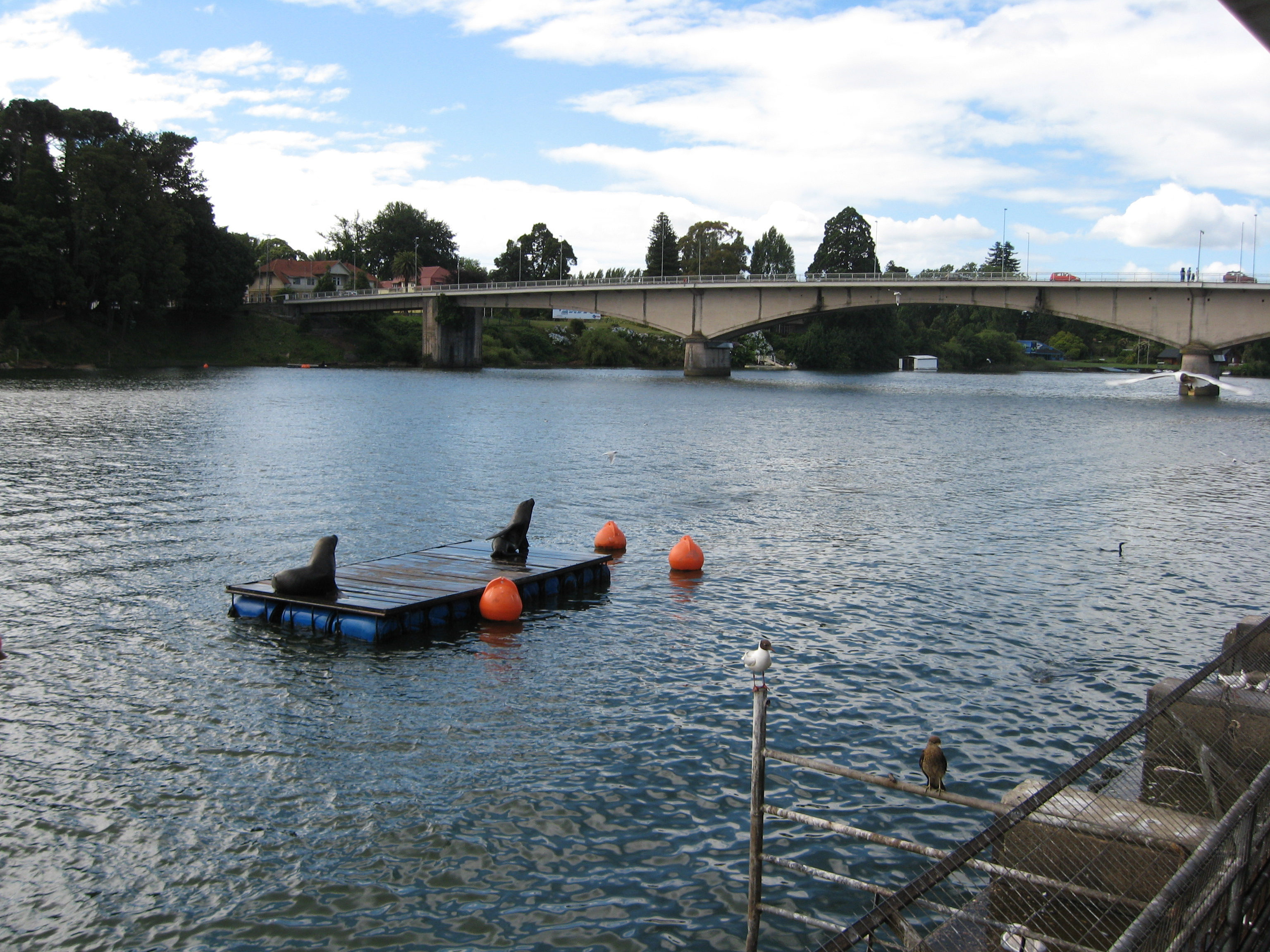 Río Valdivia, lobos marinos.